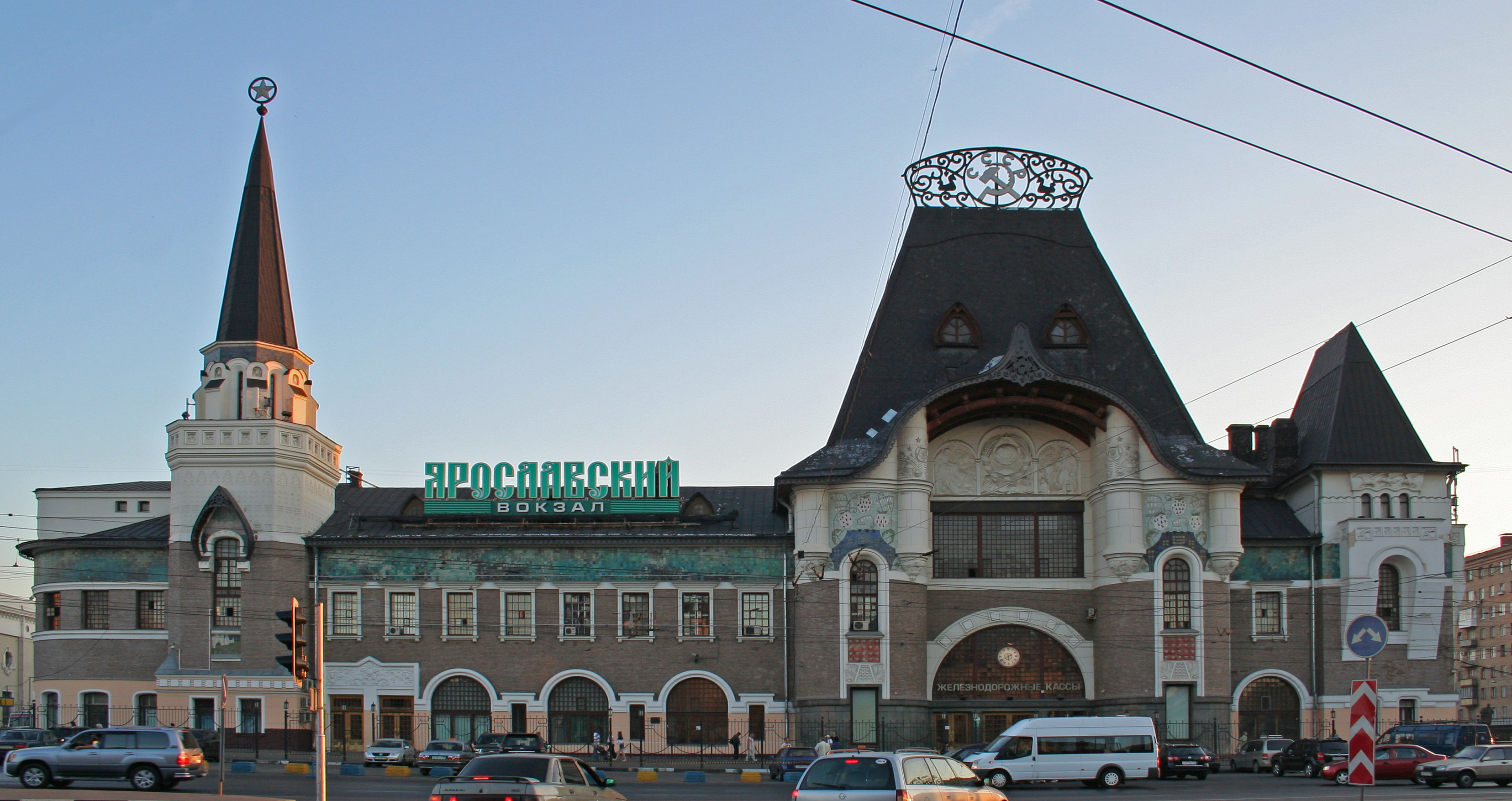 Jaroslawler Bahnhof in Moskau. Ansicht der Hauptfassade.